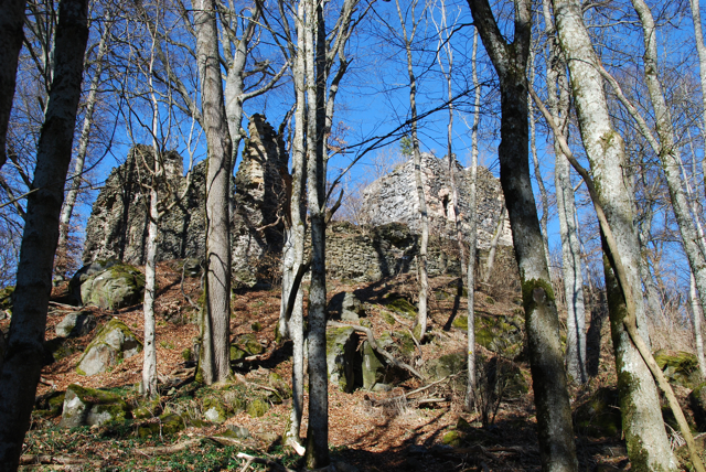 Neuhewen